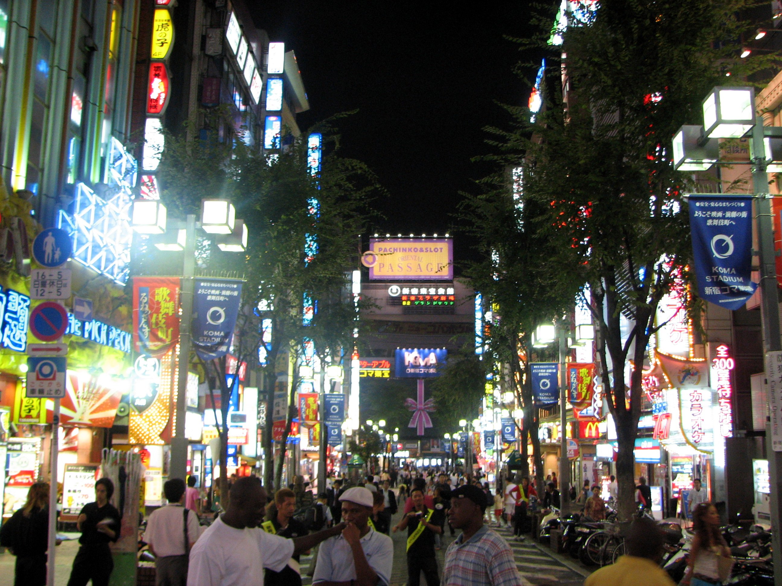 Kabukicho at night